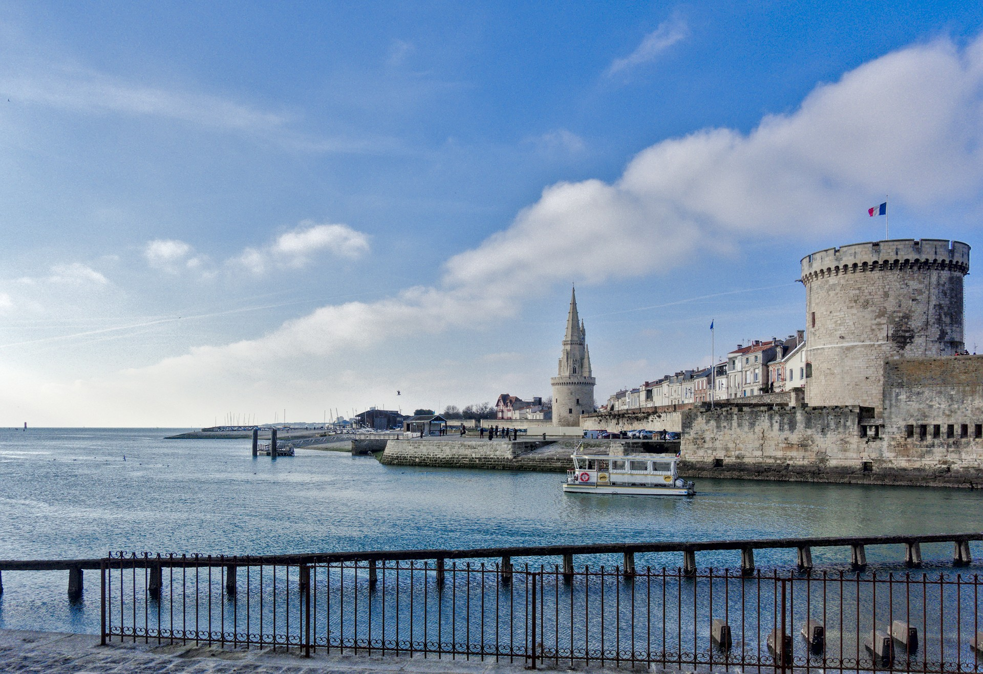 La Rochelle, Sortie du port, Tour de la Chaîne et Tour de la lanterne et la navette électrique Yelo